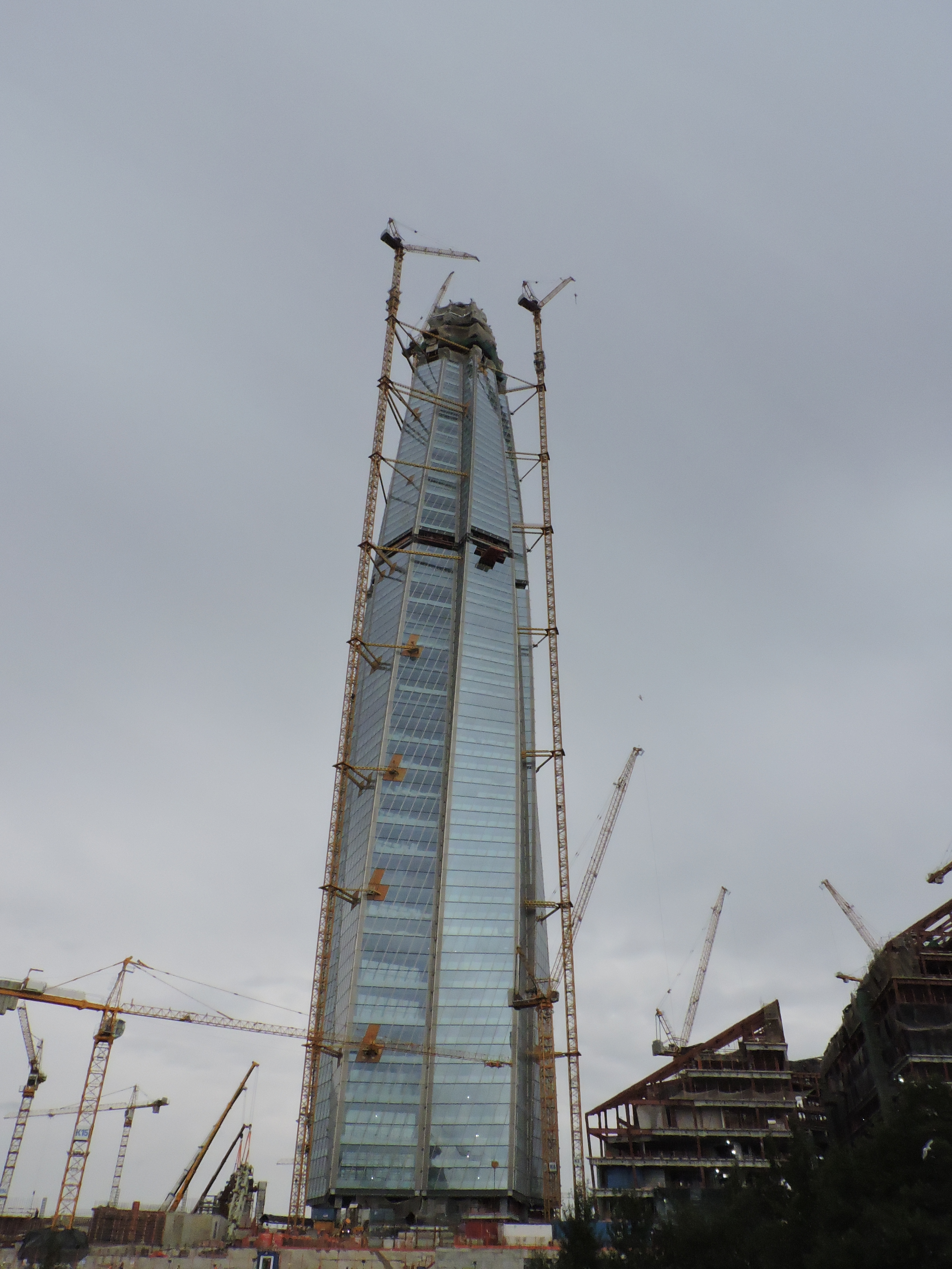 Лахта-центр в сентябре 2017 года